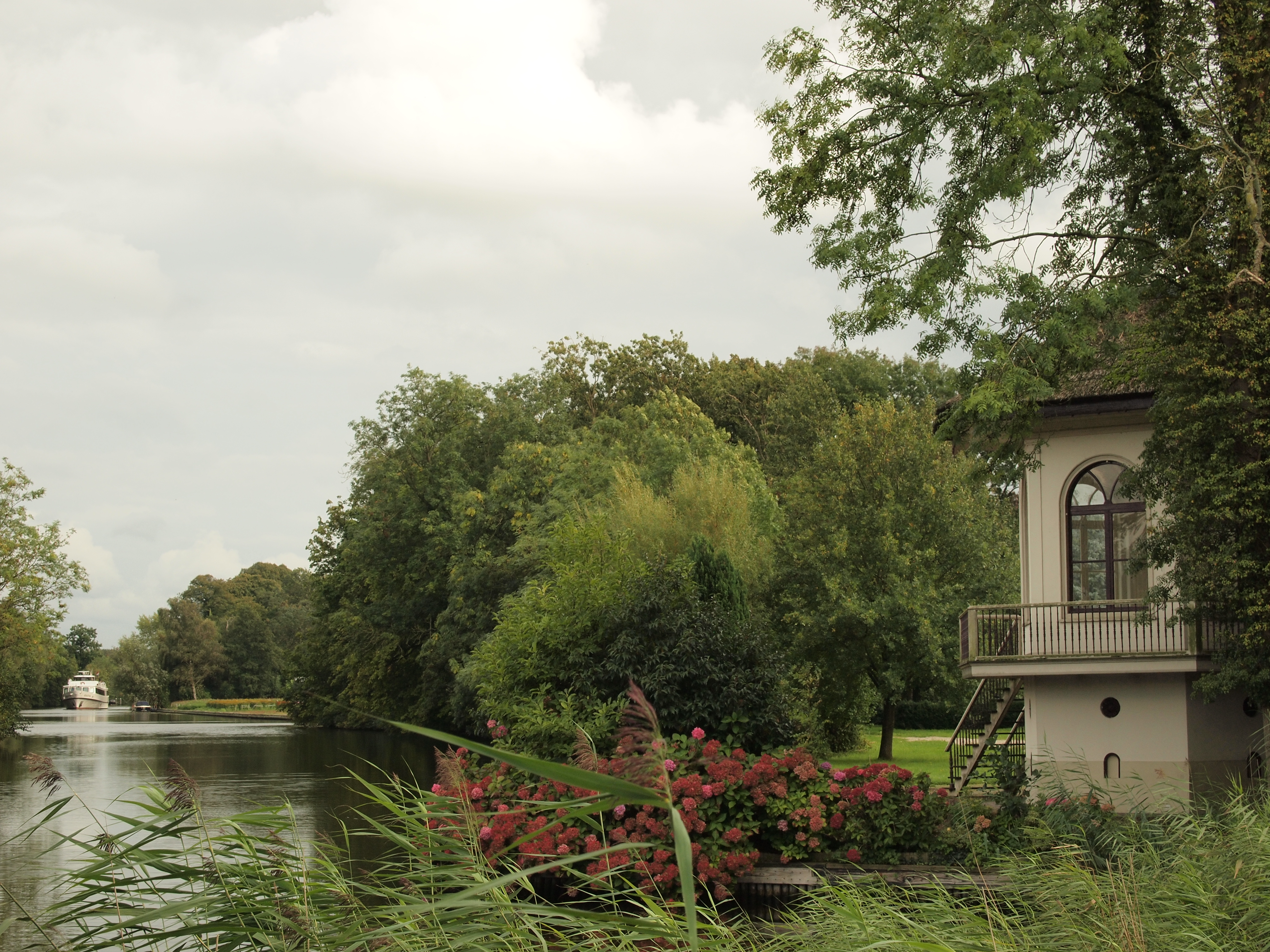 Oorspronkelijk bij Gunterstein behorende theekoepel uit omstreeks 1850.